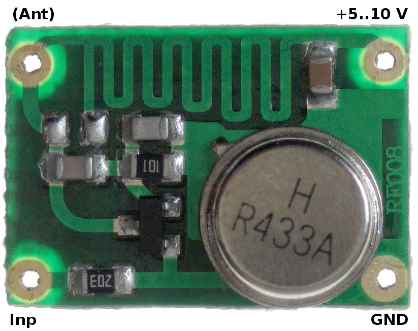 SAW resonator